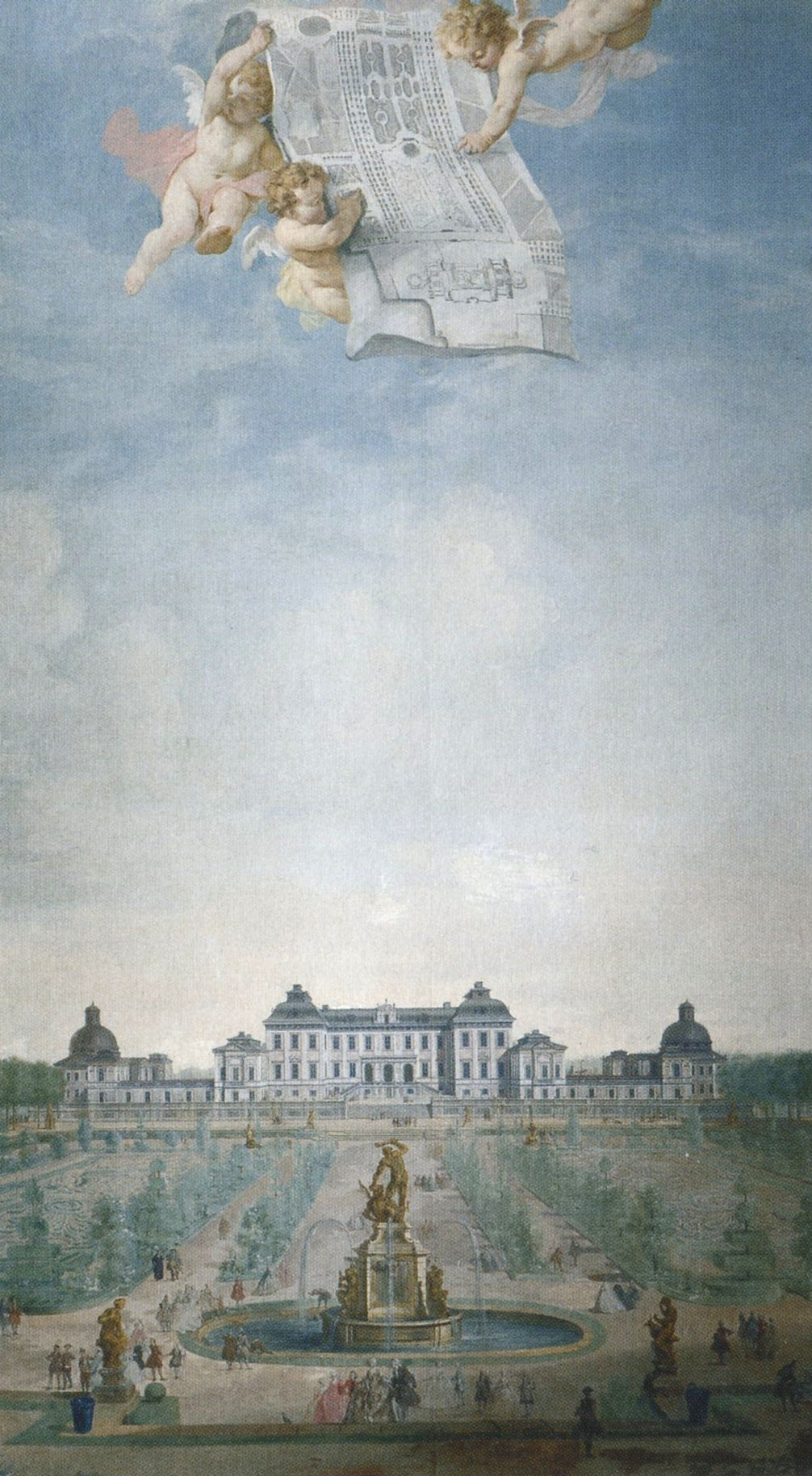 Drottningholms slott, vy mot öst från parksidan på 1740-talet. Utsnitt (den översta delen fattas) av väggfält i Länsresidenset i Nyköping, 1740-talet. Drottningholms slott från trädgårdssidan med Herkulesfontänen i förgrunden.Oljemålning i väggfält i Länsstyrelsens byggnad i Nyköping, där landshövdingens tjänsterum pryds av väggmålningar. Bilden visar Drottningholm i dess ursprungliga skick. Huvudslottet förbinds med hörnpaviljongerna av envåniga längor. Under drottning Lovisa Ulrikas tid påbyggdes dessa längor med en våning varvid slottet fick sitt nuvarande utseende. Slottets ursprungliga färgsättning, rosa och grått, poängterar byggnadens skulpturala karaktär. I barockträdgården med rikt utformade broderiparterrer, uppbyggda av låga buxbomshäckar och formklippta träd, ses den nederländske skulptören Adriaen de Vries' (1556-1626) stora Herkulesfontän. Adriaen de Vries' skulpturer i parken är krigsbyten från Prag och Fredriksborgs slott i Danmark. Det krossade teglet på parkens trädgårdsgångar var omsorgsfullt valt för att passa till slottets tegelröda färg. Änglarna på den lilla bilden högst upp på målningen visar fram en karta över slottet och parken.